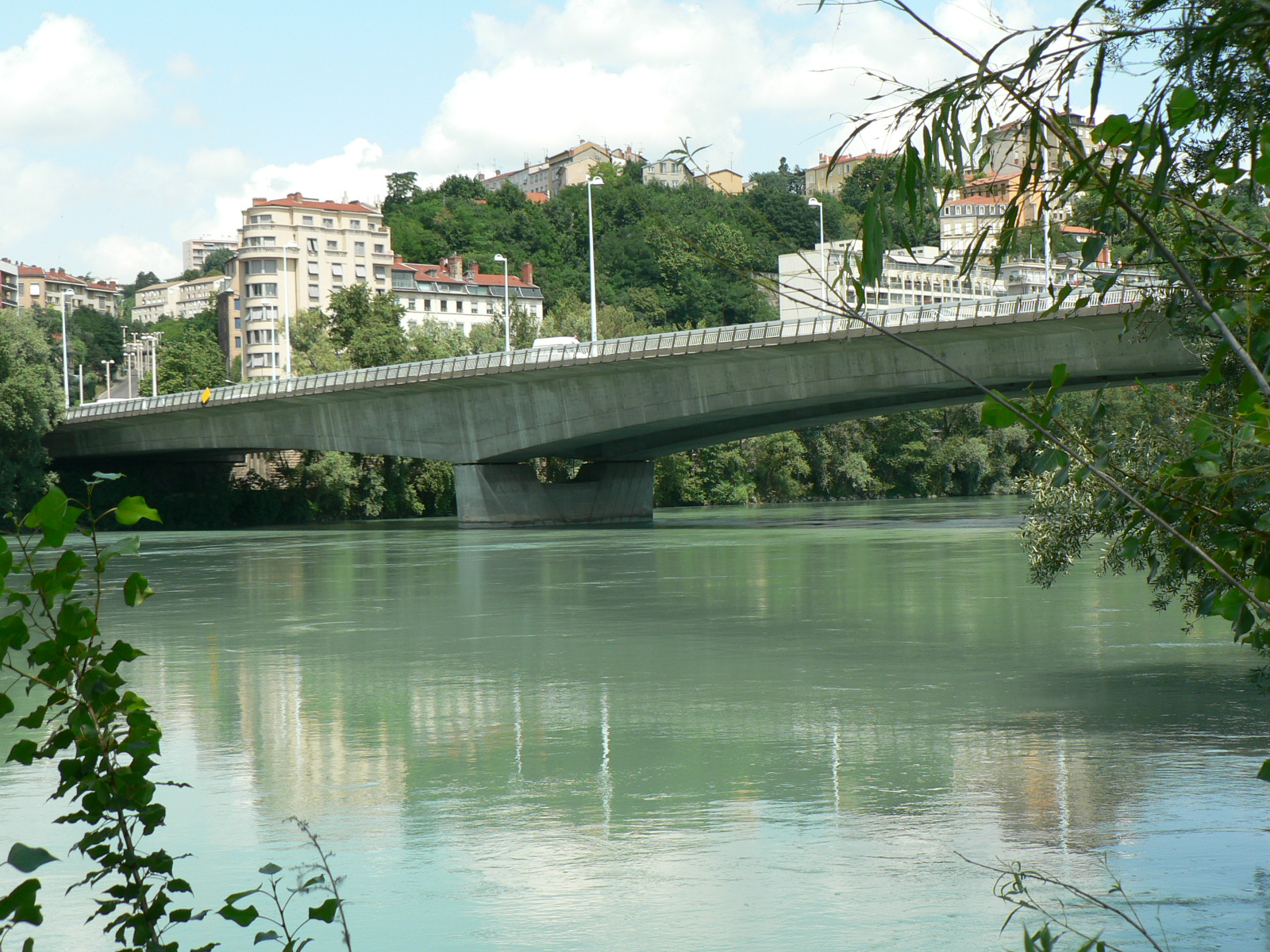 Ponts de Lyon – Pont Winston Churchill